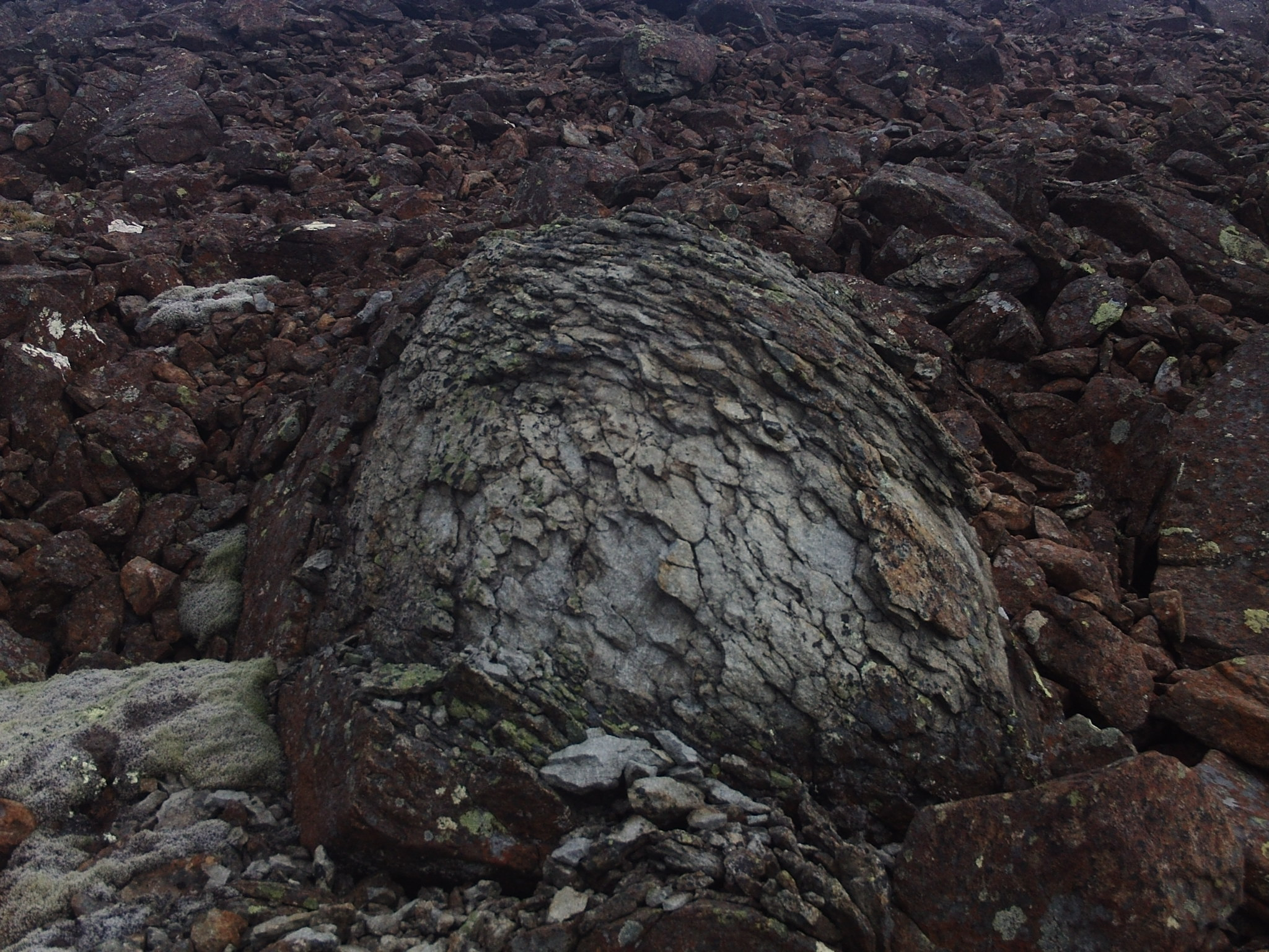 Морозное выветривание валуна дунитов на гольце Йоко-Довырен в Северном Прибайкалье.